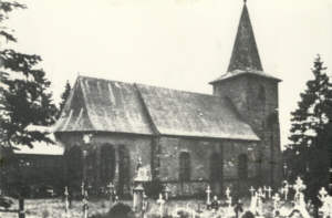 Alte Kirche in Bütgenbach